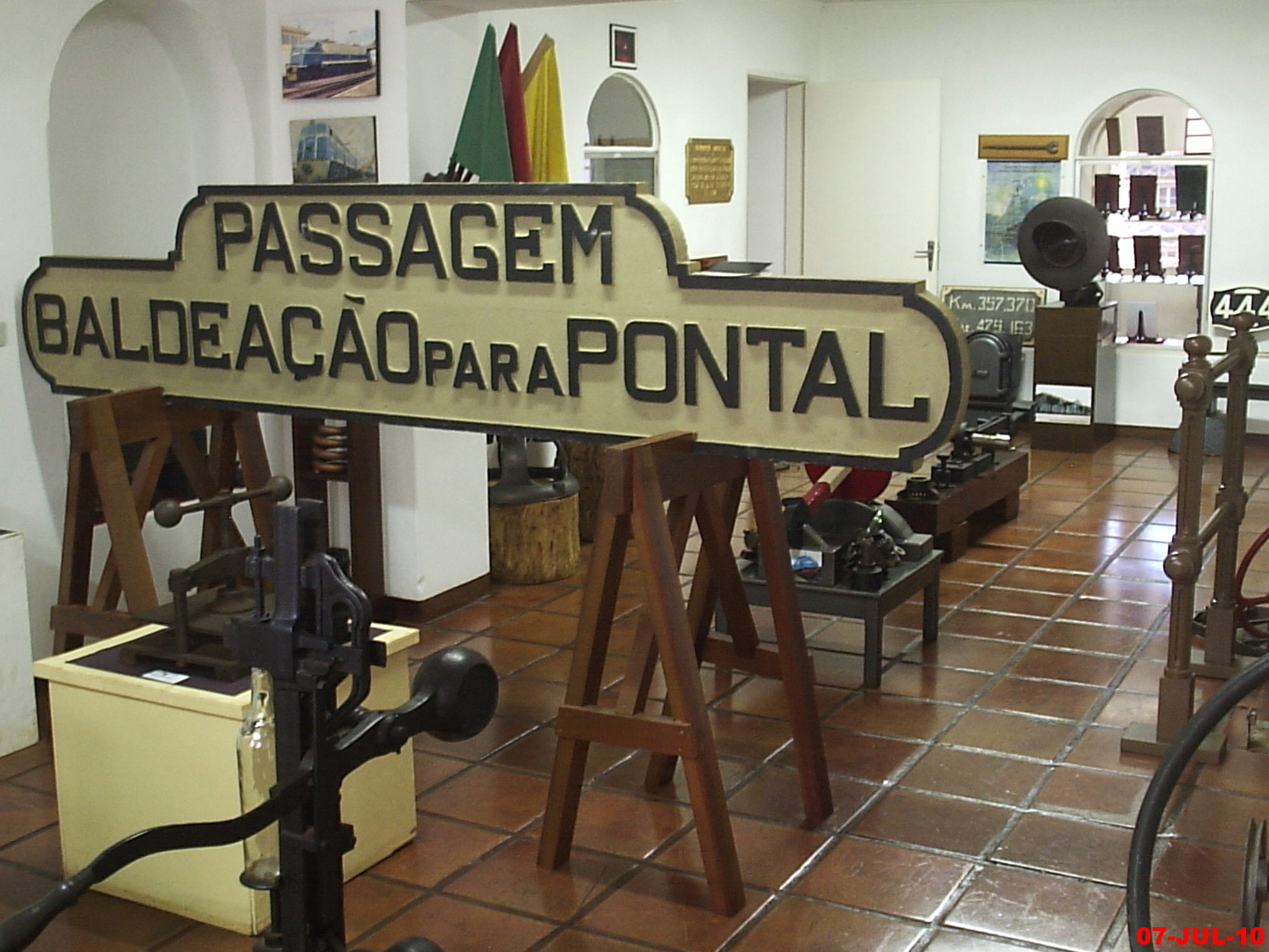 Parte Ferroviária no Museu Histórico Aloísio de Almeida em Jaboticabal